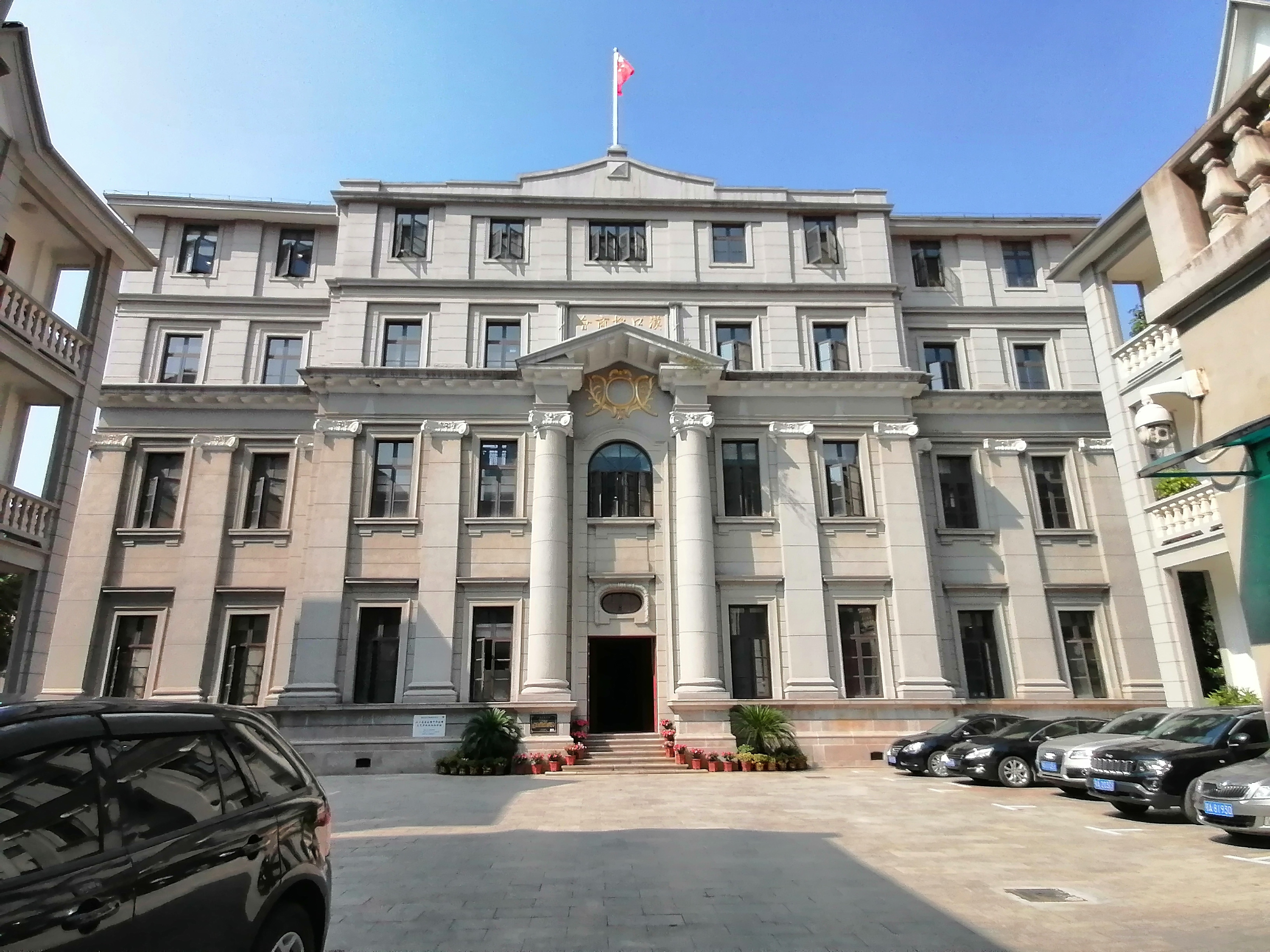 汉口总商会暨中华全国文艺界抗敌协会旧址，中华人民共和国第八批全国重点文物保护单位之一。